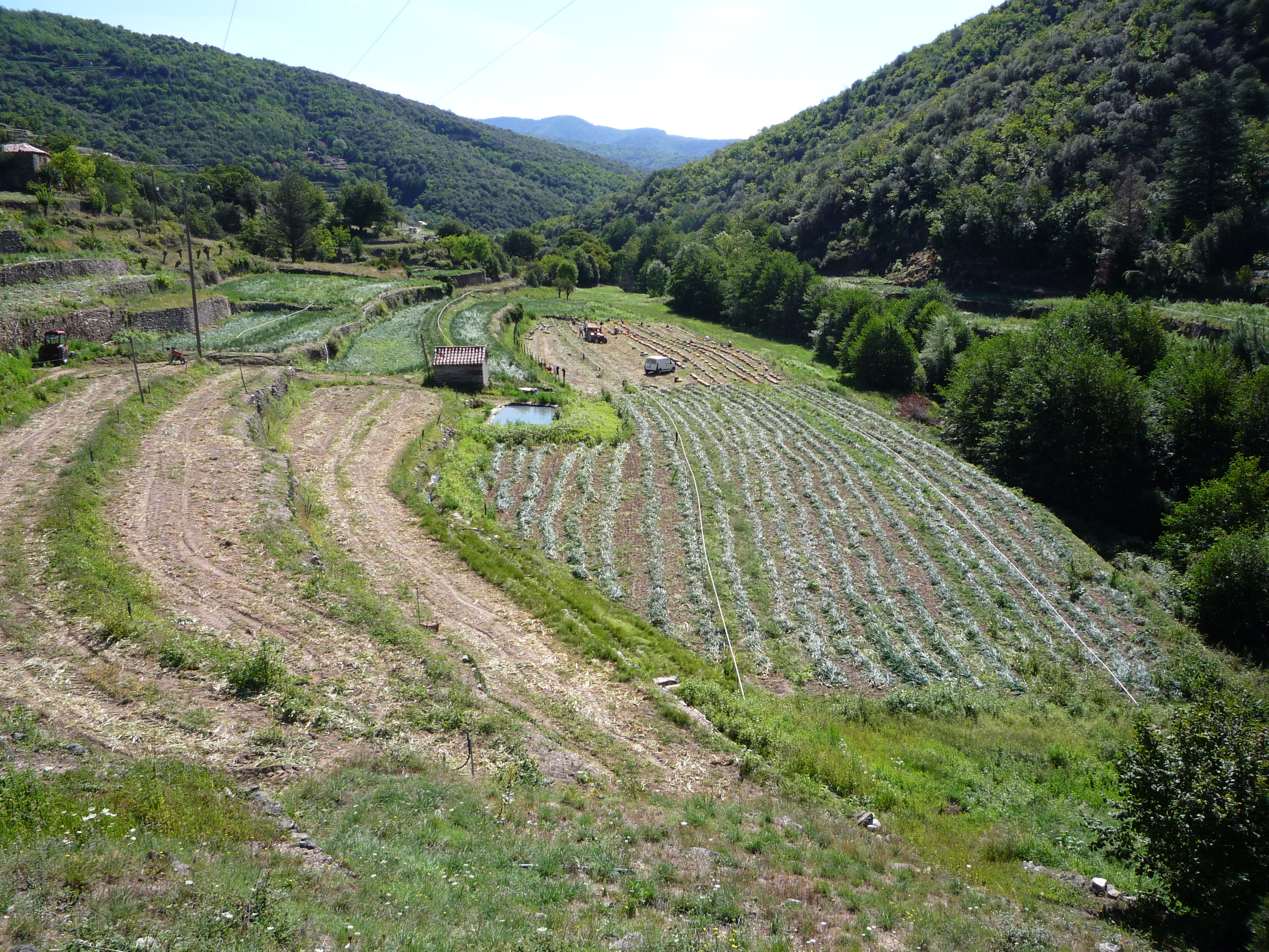 L'arrachage de l'Oignon Doux des Cévennes